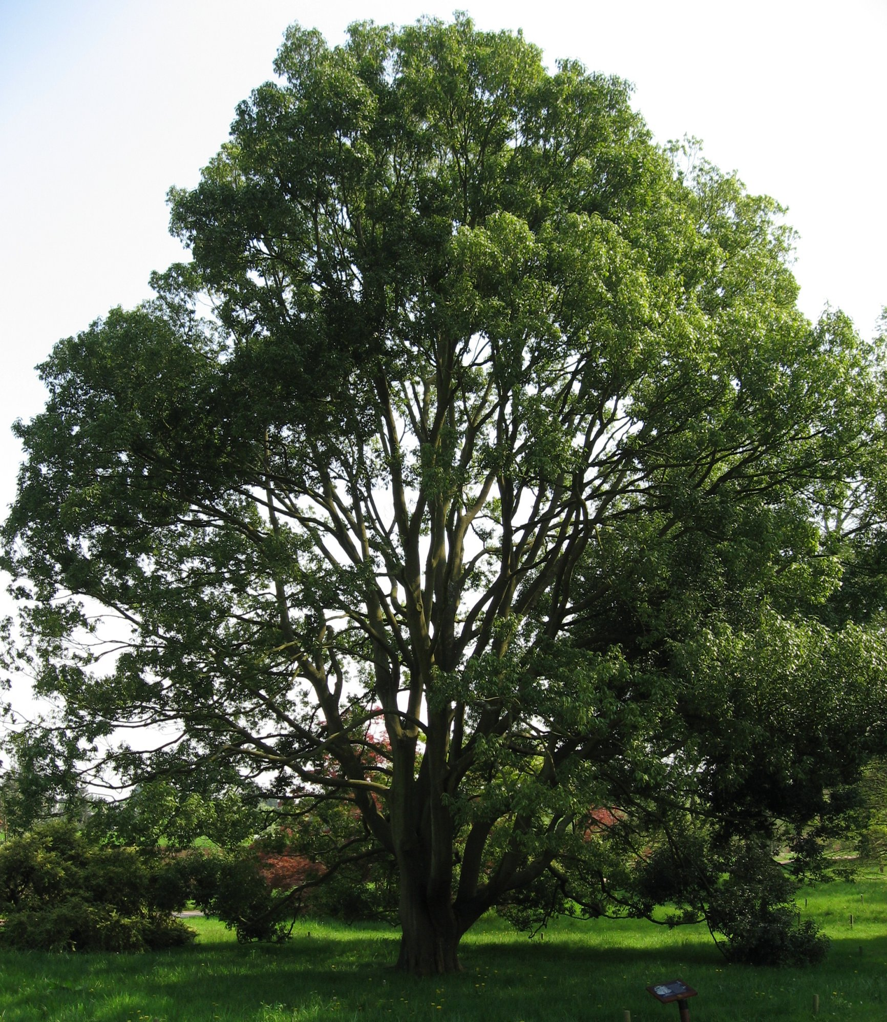 Quercus myrsinifolia or Cyclobalanopsis myrsinifolia Bl. non Schiras (Chêne à feuilles de myrsine) (16m high) in Arboretum de la Vallée-aux-Loups Map: 48° 46' 22" N 2° 16' 5" E